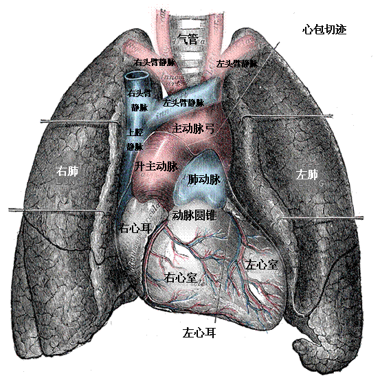 更新，选择了一种更好的方式汉化